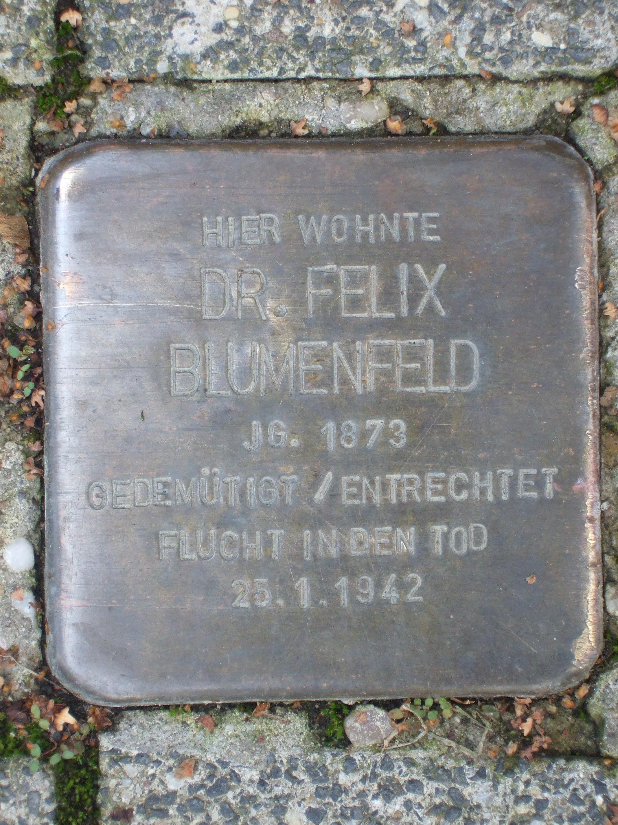 Stolperstein Felix Blumenfeld